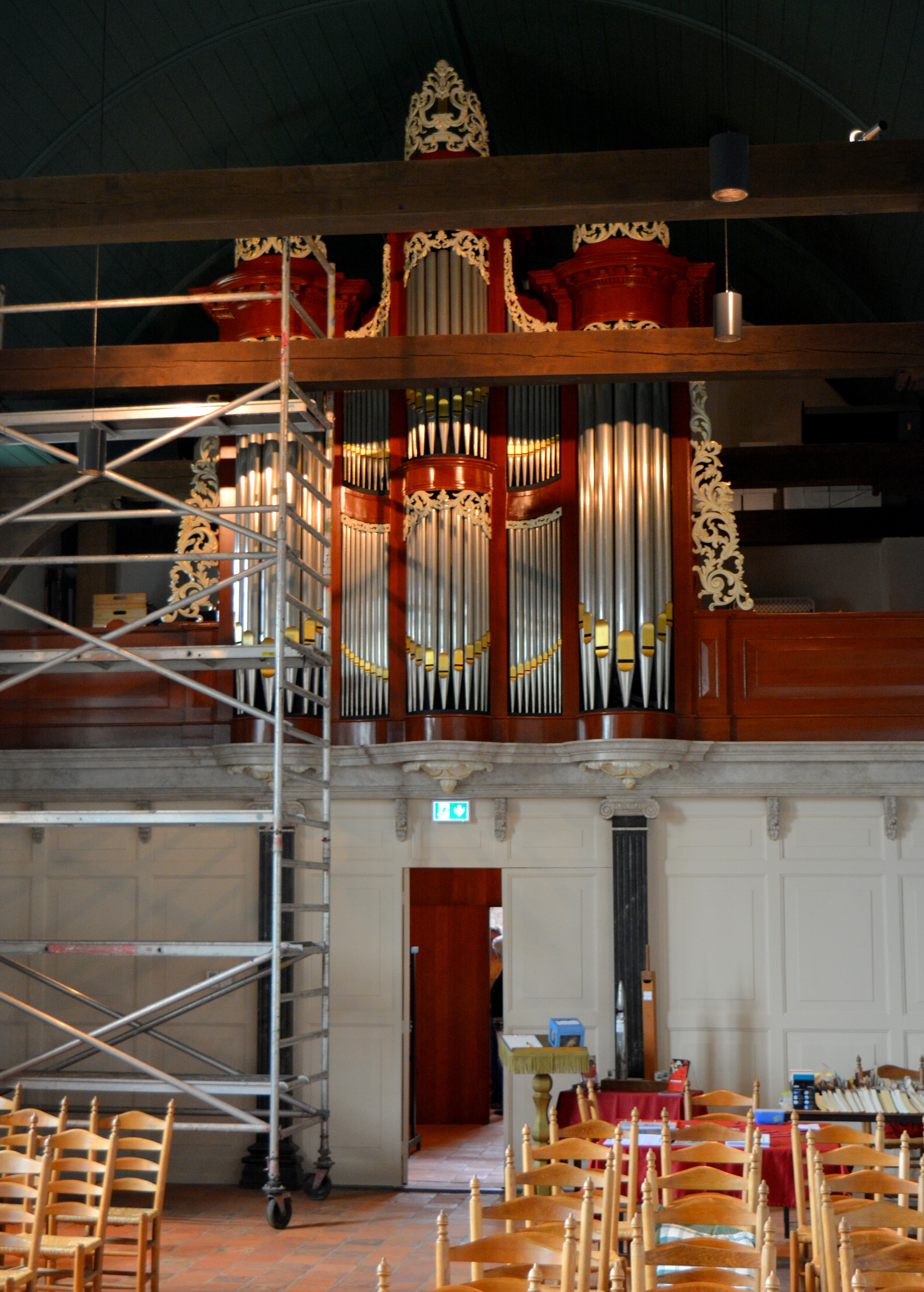 Deinum, Johannes de Doperkerk, orgelrestauratie